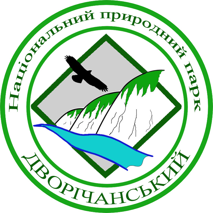 Логотип Національного природного парку "Дворічанський"